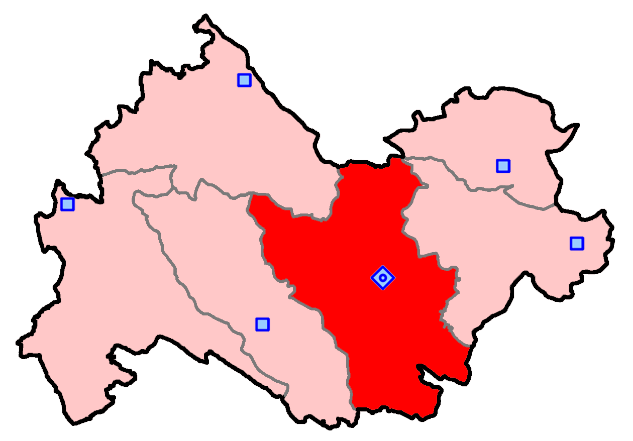 حوزه‌ کرمانشاه برای انتخابات مجلس شورای اسلامی